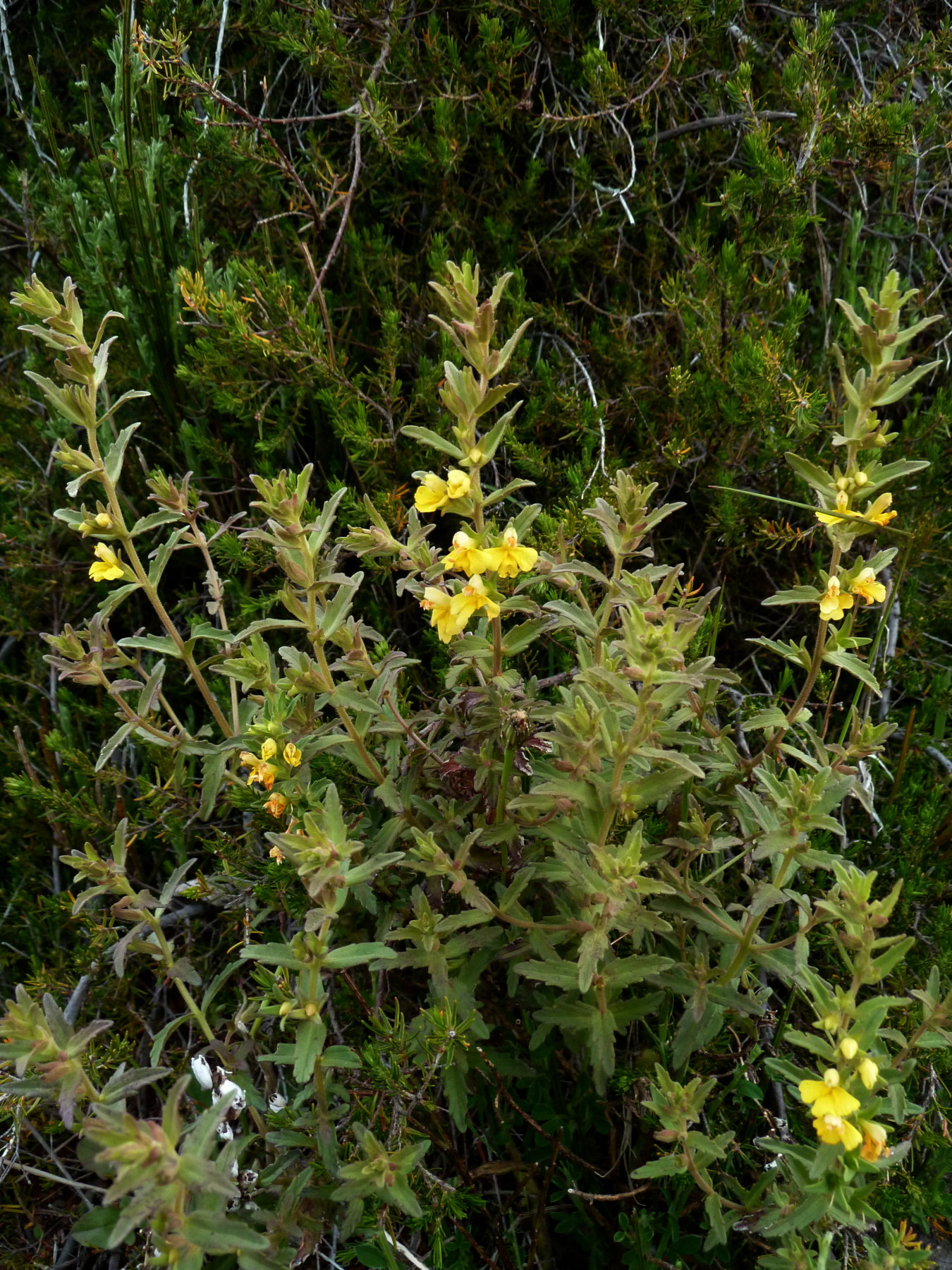 Odontites holliana, Ile de Madère